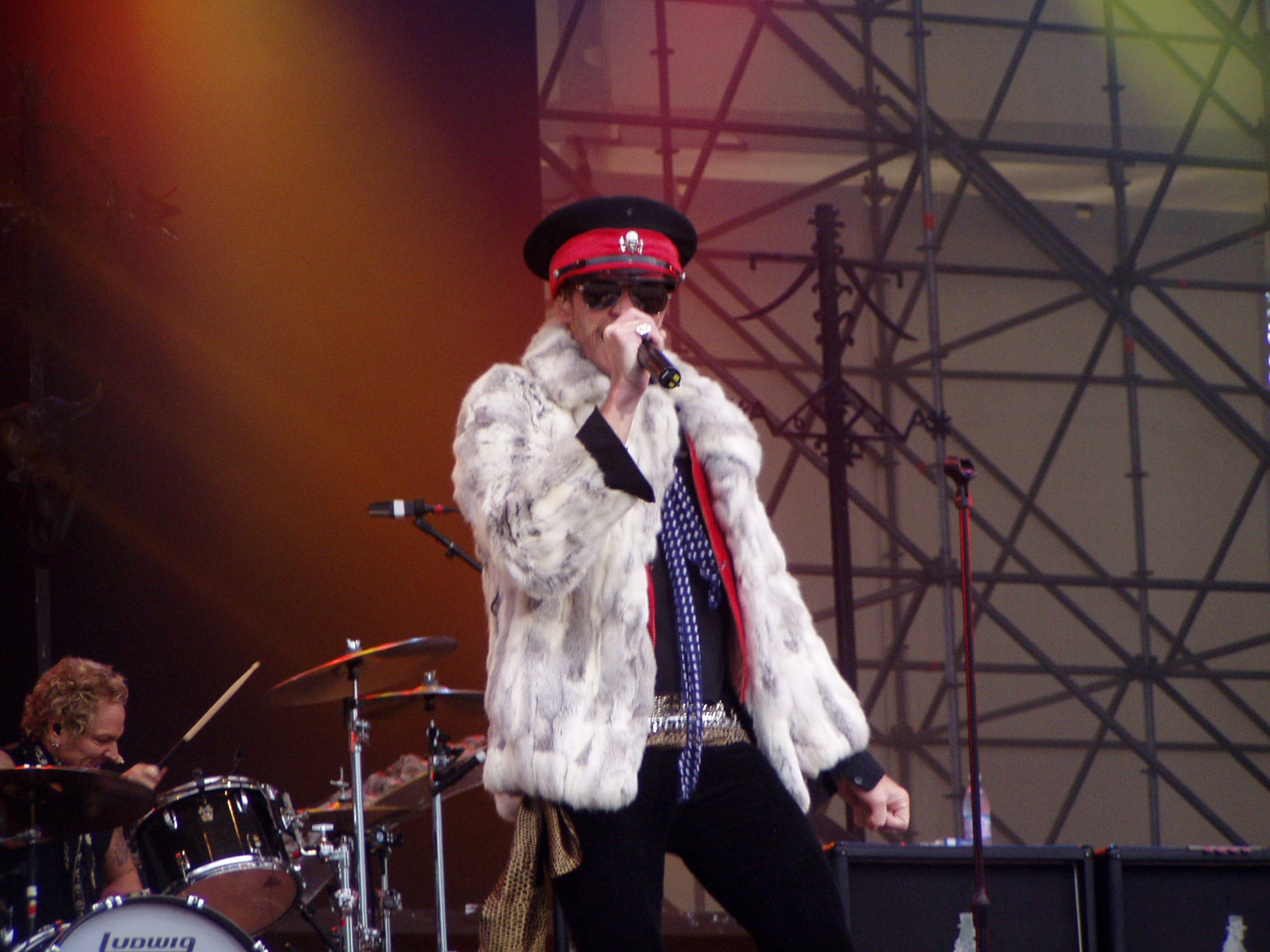 I Velvet Revolver al Gods of Metal 2007